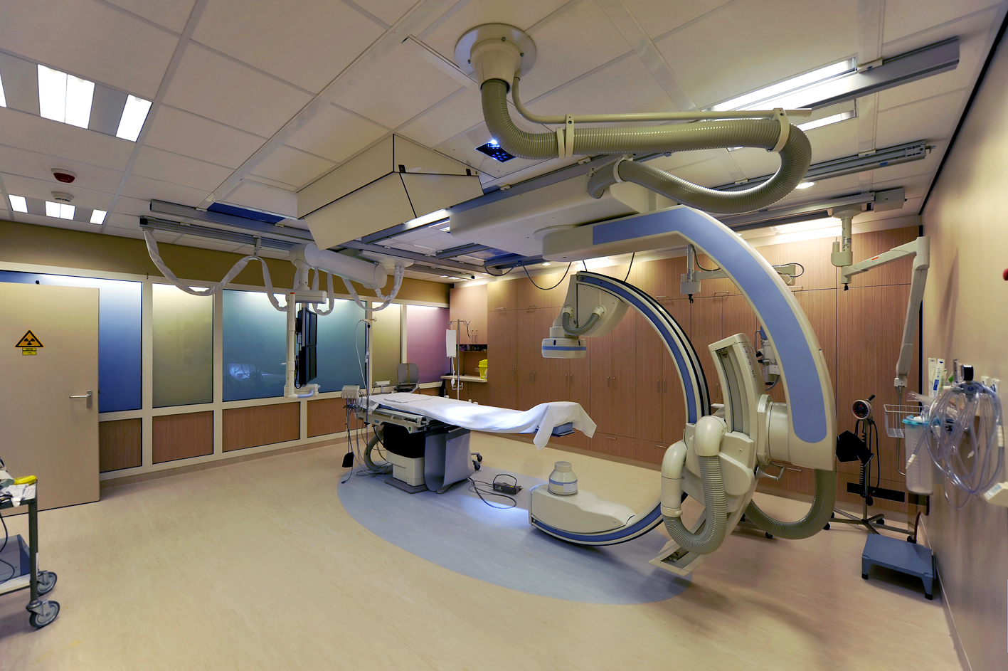 HCK Tergooiziekenhuizen Blaricum